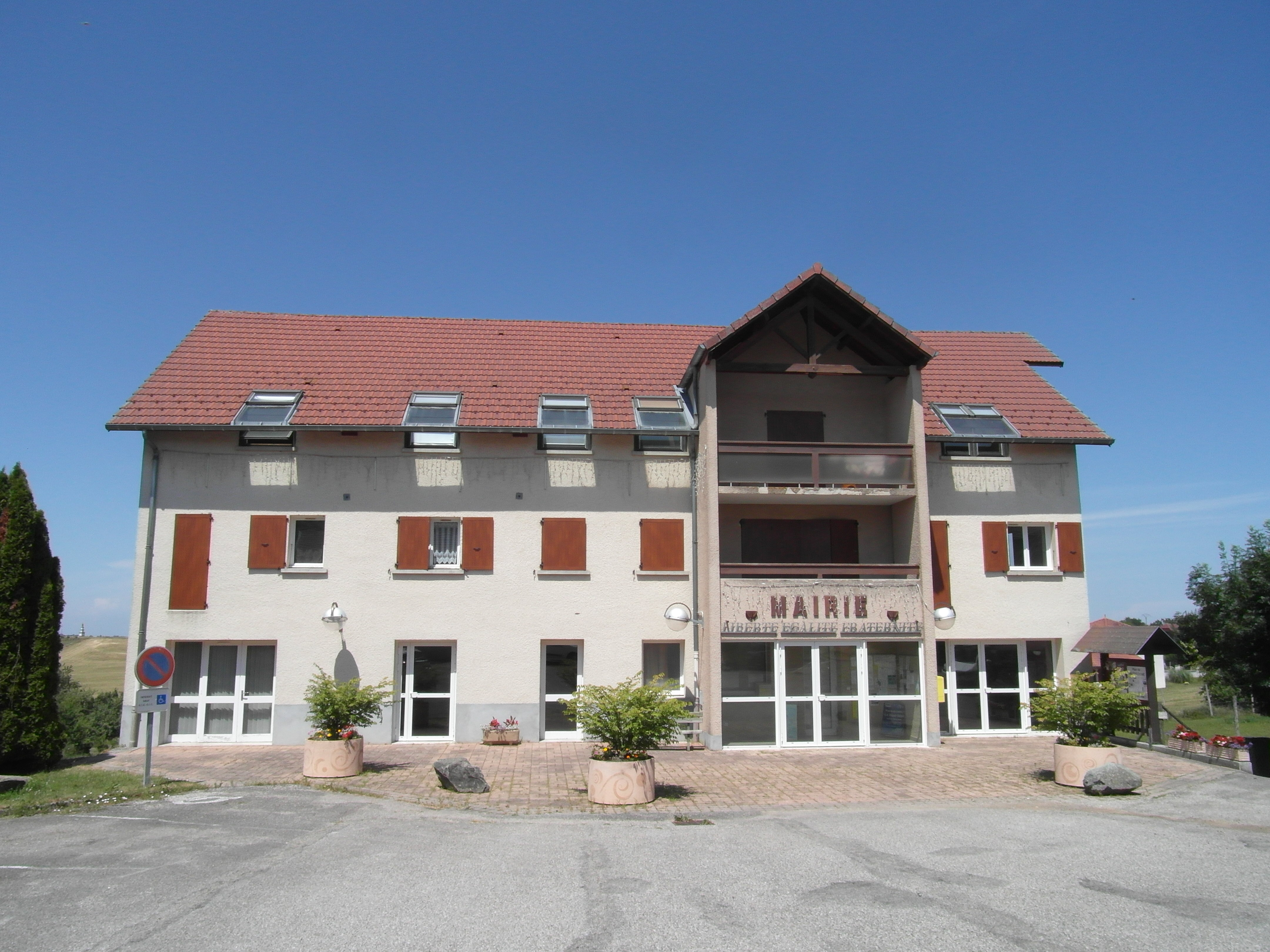 Valencogne town hall (mairie)